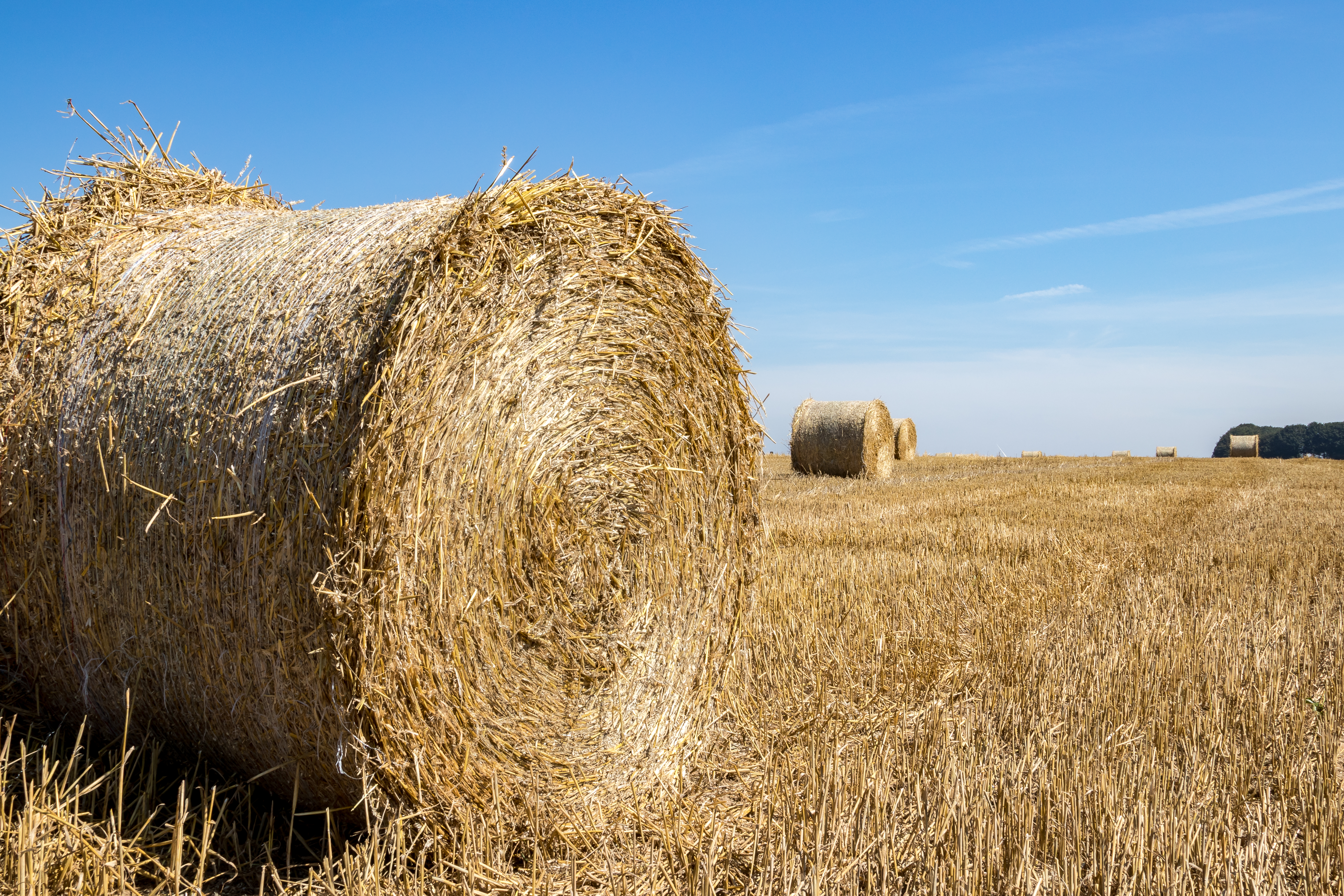 Stoppelfeld mit Stroh-Rollen in der Normandie